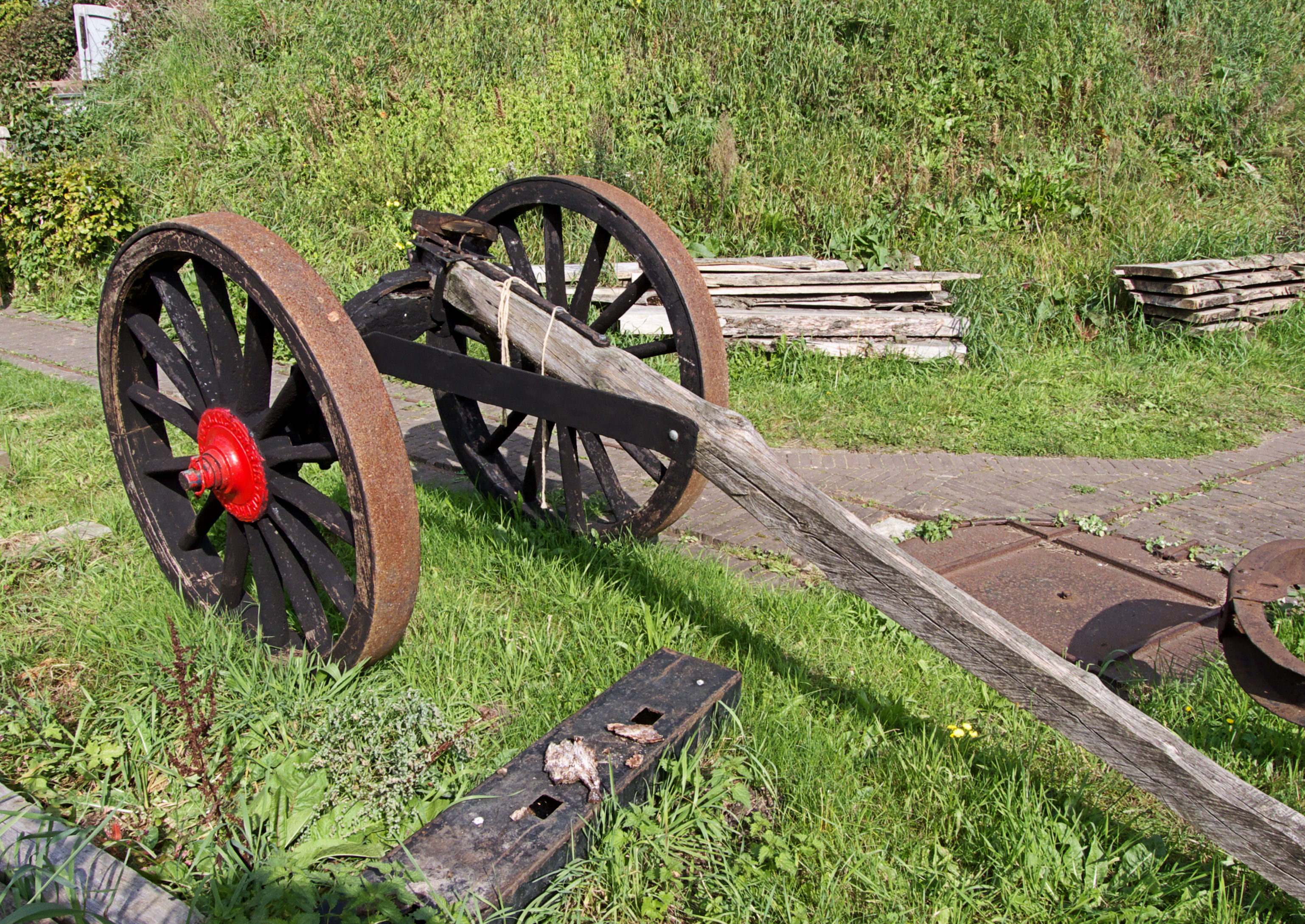 Holten's molen, Deurne, mallejan voor boomstamtransport